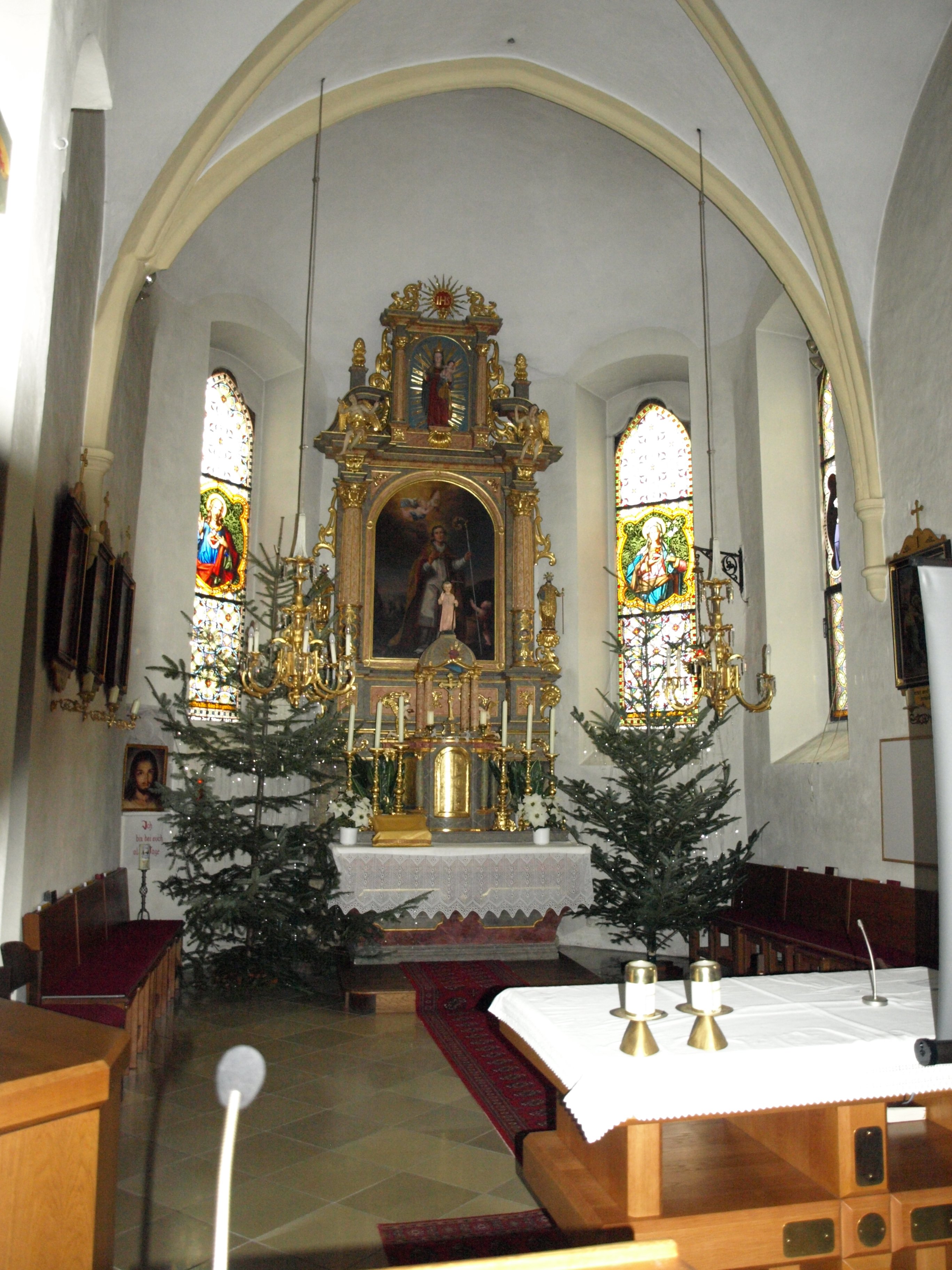 Kath. Pfarrkirche hl. Ruprecht